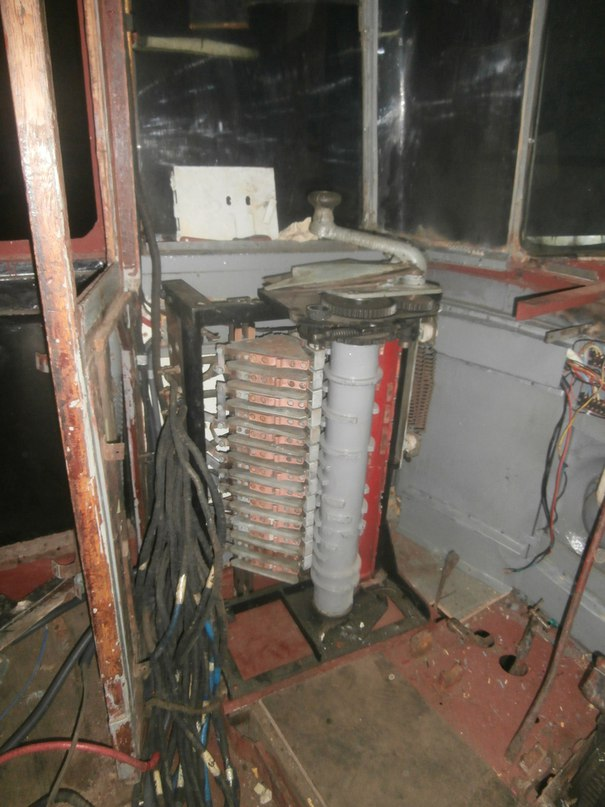 Контроллер вагона Gotha T59E (без дугогасительных камер)